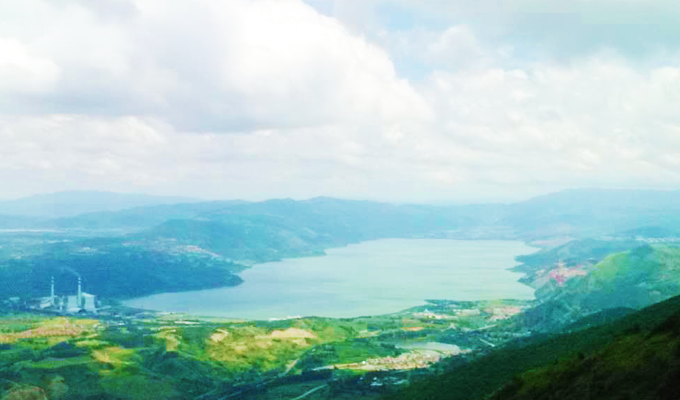 从宜良老爷山上眺望阳宗海。